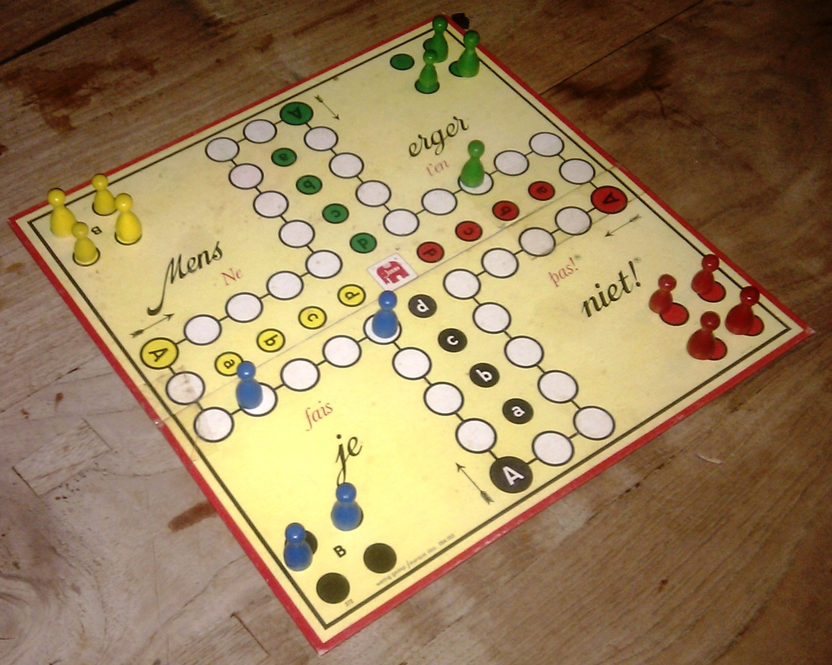 Mens erger je niet